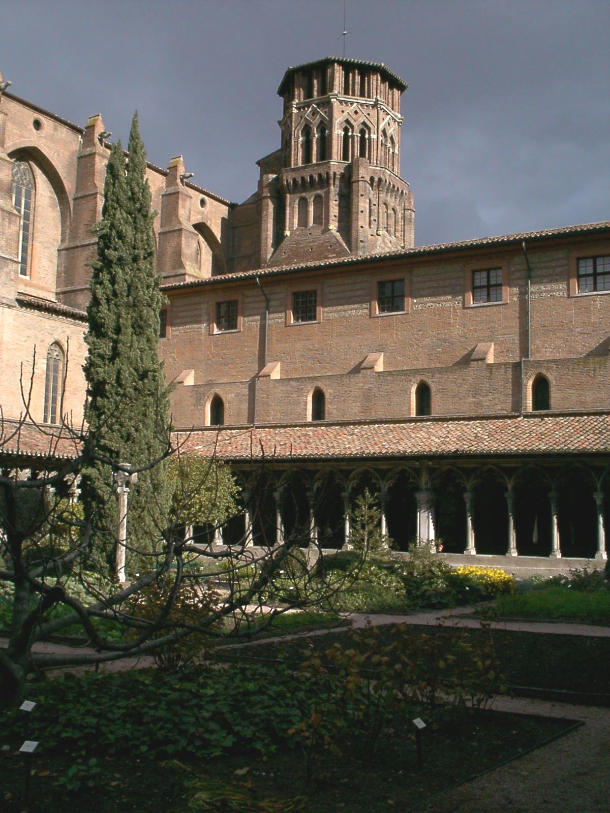 Musée des Augustins in Toulouse, vor der Französischen Revolution Augustinerkloster, darin Mausoleum der Fermats